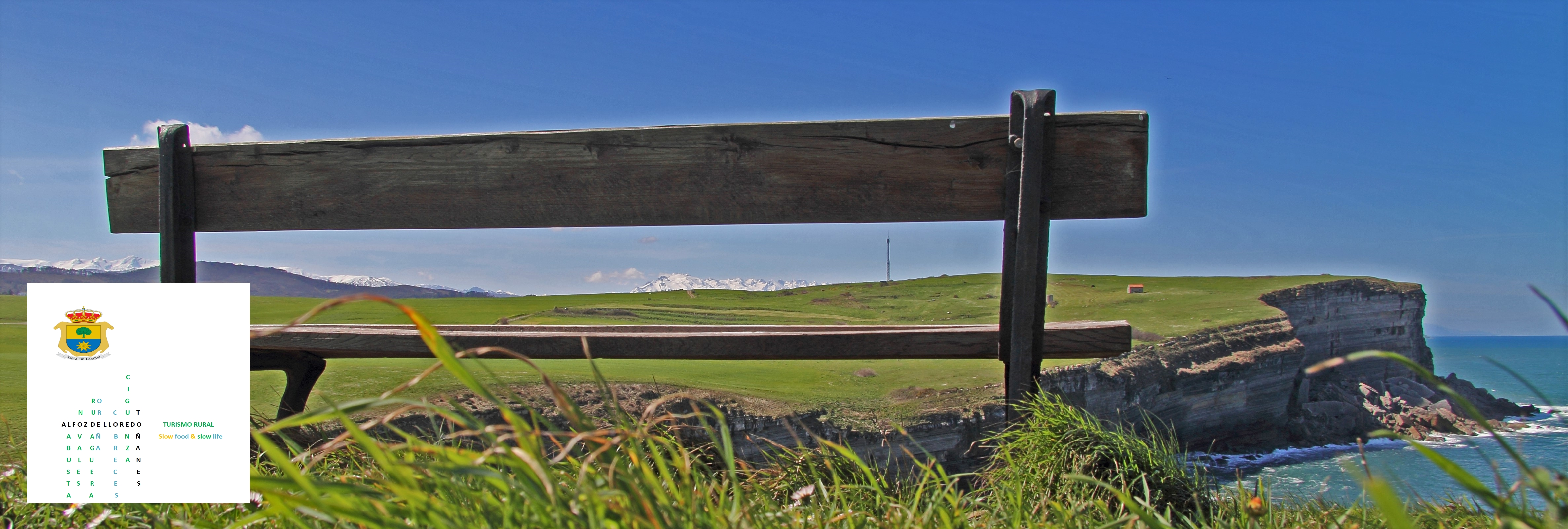 EN EL PUEBLO DE TOÑANES, SE ENCUENTRA ESTE MIRADOR DONDE SE CONTEMPLA LOS PICOS DE EUROPA, LOS ACANTILADOS DE ALFOZ DE LLOREDO Y EL MAR CANTÁBRICO.